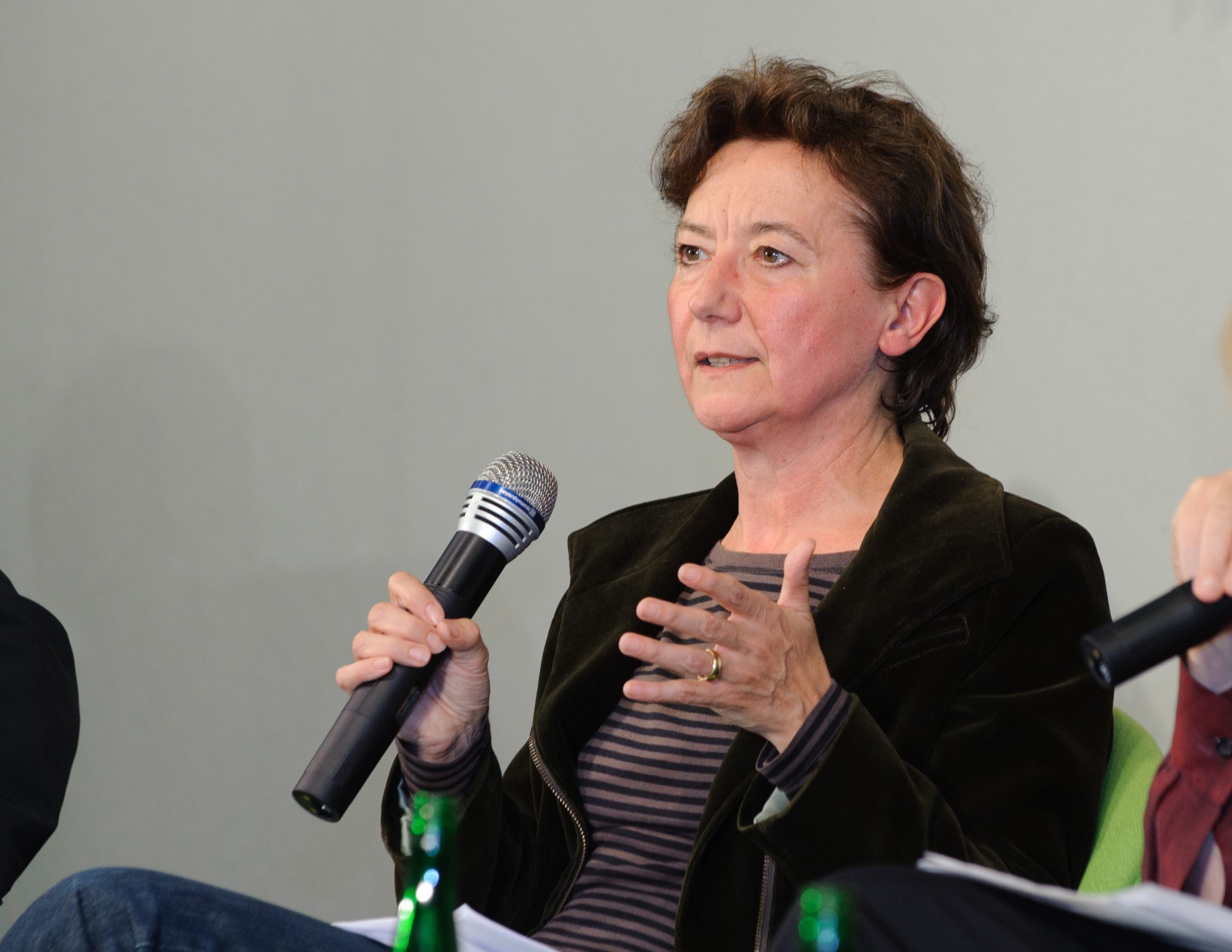 Foto: CC-BY-SA Stephan Röhl Die Bilder enstanden bei der Veranstaltung: "Ü30! Die Grünen vor neuen Herausforderungen" 30 Jahre Grüne. Die einst kleine Ökopartei ist zu einer festen Größe in der politischen Landschaft geworden. Ökologie, nachhaltiges Wirtschaften, Umweltschutz, erneuerbare Energien und Gleichstellung sind im gesellschaftlichen Mainstream angekommen. Sie werden deshalb auch von anderen Parteien aufgegriffen. Selbst sind die Grünen im Stimmungshoch, nicht nur in der Hauptstadt. Wie können sie dieses inhaltlich und programmatisch ausfüllen? Die Heinrich-Böll-Stiftung bringt führende Grüne mit herausragenden Gästen aus Kultur, Wissenschaft, Unternehmen und Gewerkschaften zusammen, um der Partei einen Spiegel vorzuhalten und gemeinsam darüber zu reden, welches die großen grünen Themen der nächsten zehn Jahre sind.